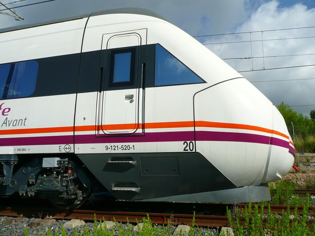 Morro de una Serie 121 de Renfe